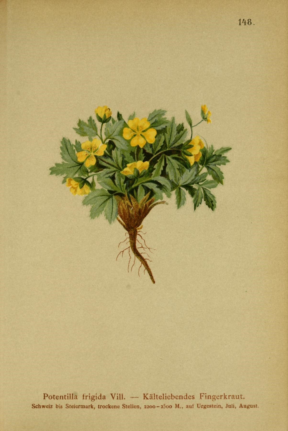 148 Potentilla trigida Vill. — Kälteliebendes Fingerkraut. Schweiz bis Steiermark, trockene Stellen, 2200-2500 M„ auf Urgestein, Juli, August.